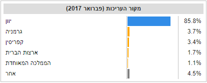 מקור